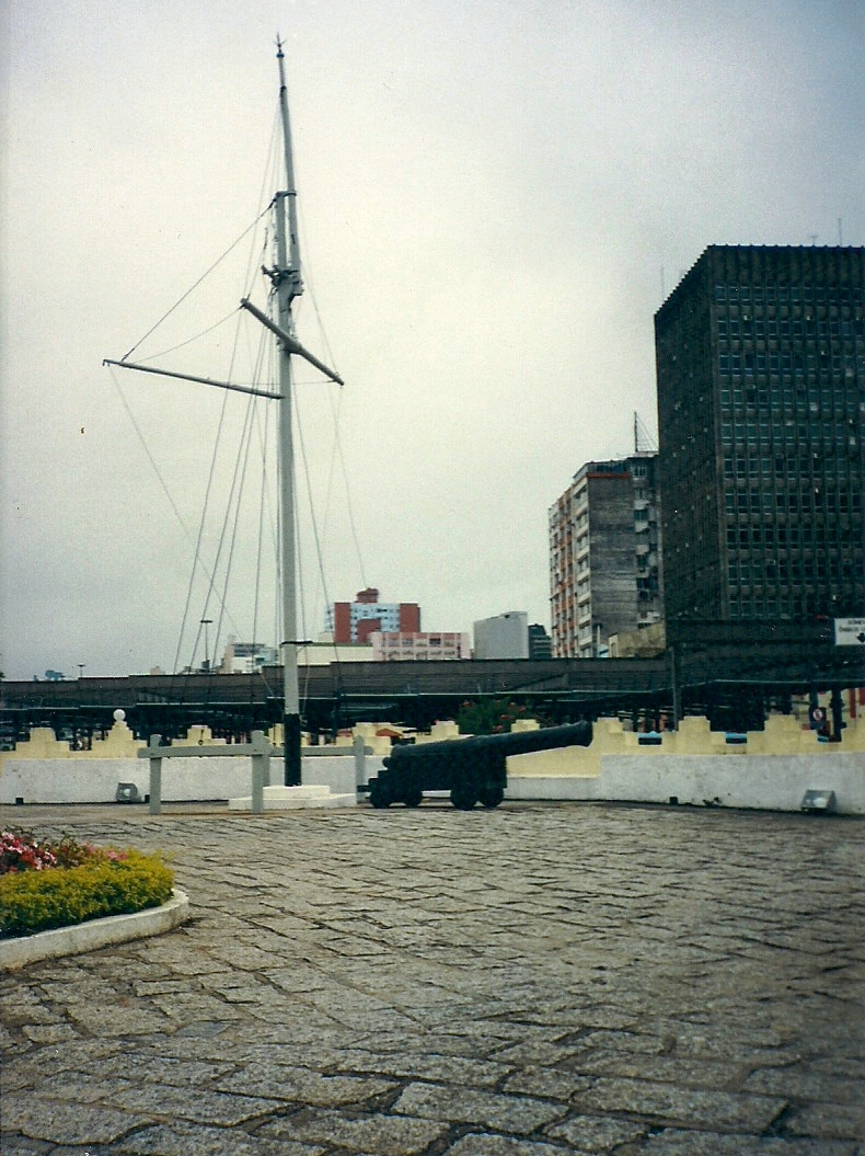 Forte de Santa Bárbara da Vila, Florianópolis, SC, Brasil: aspecto do terrapleno.